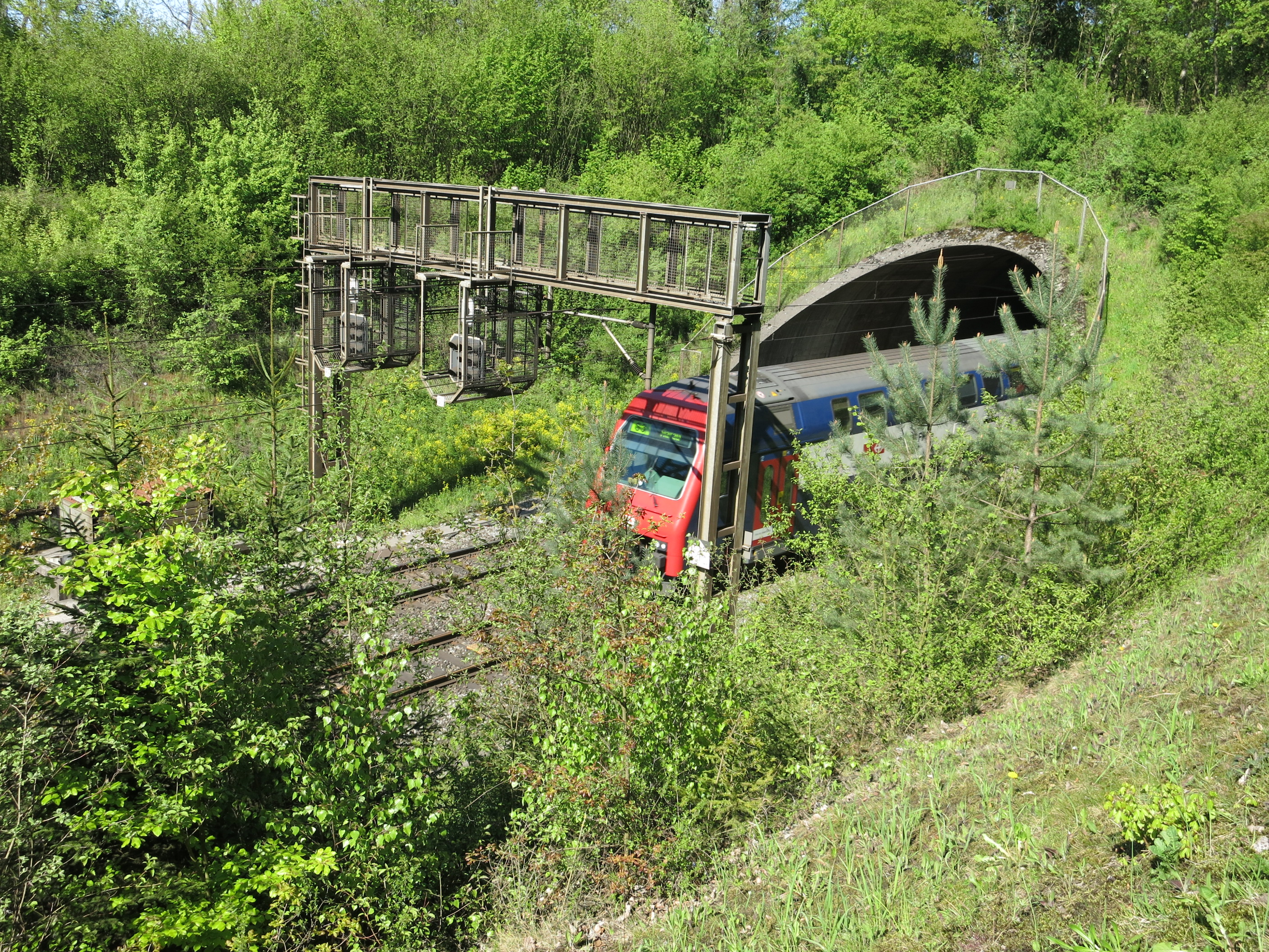 Heitersbergtunnel, Mellingen AG, Schweiz